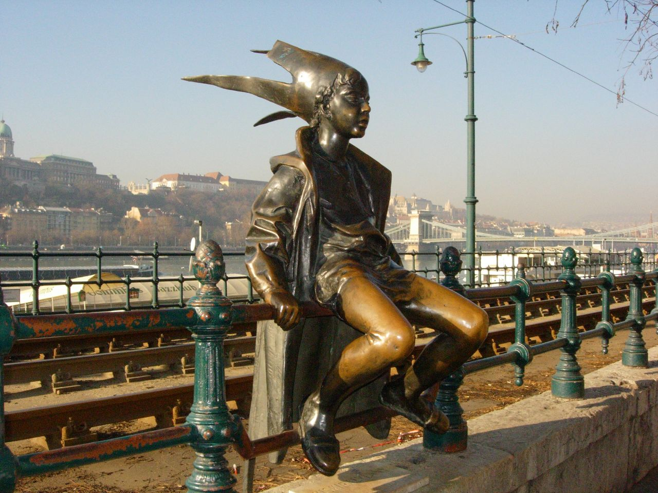 La Princesita, Lazslo Marton